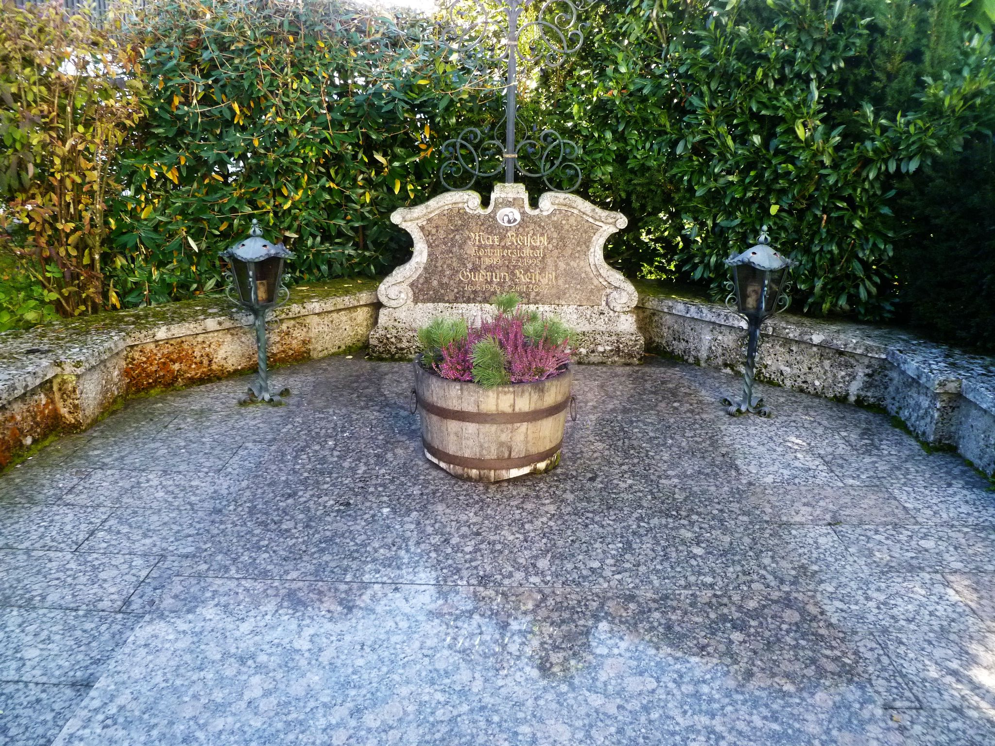 Kath. Filialkirche hl. Georg